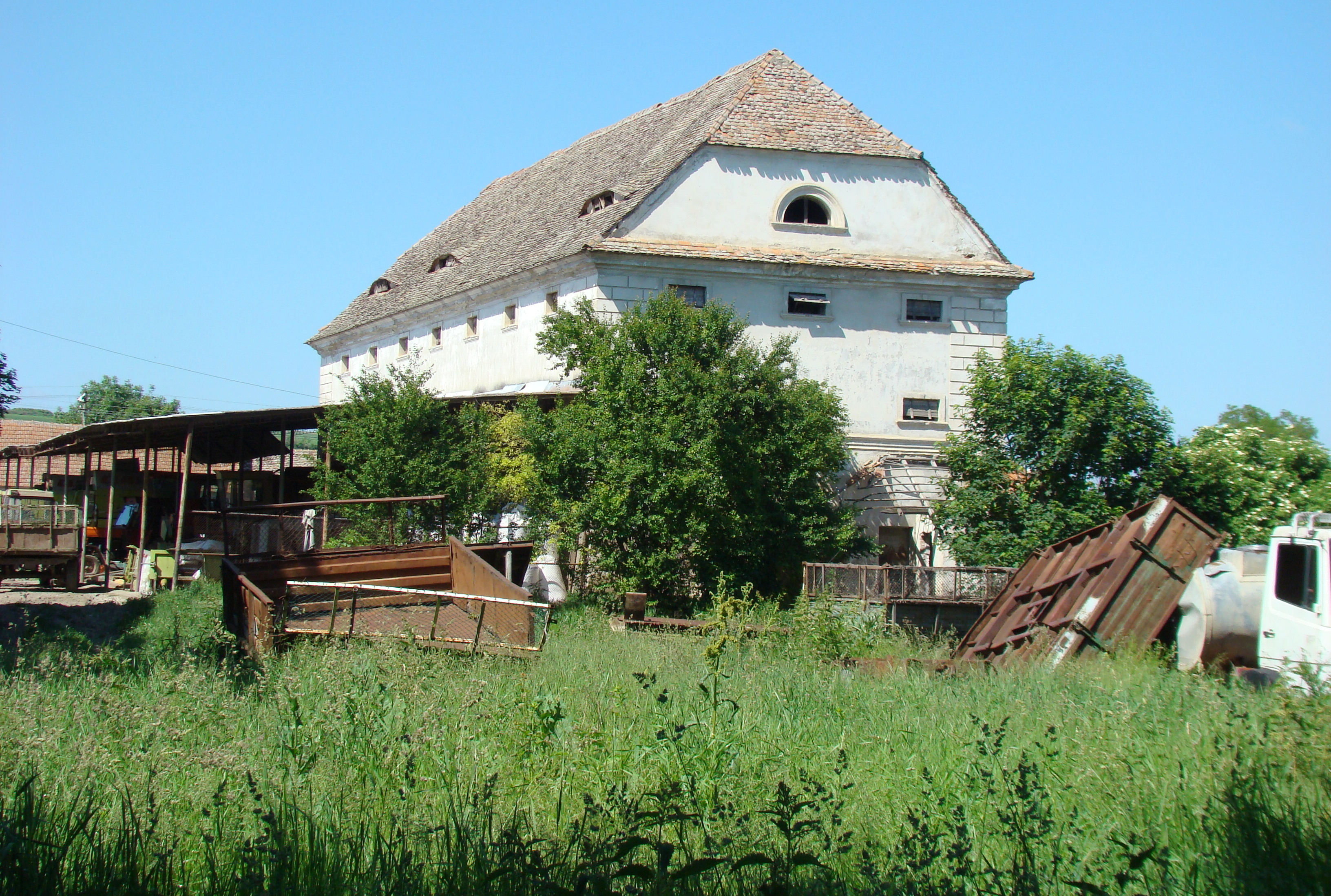 Grânar, sat Sânmiclăuș; comuna Șona 02